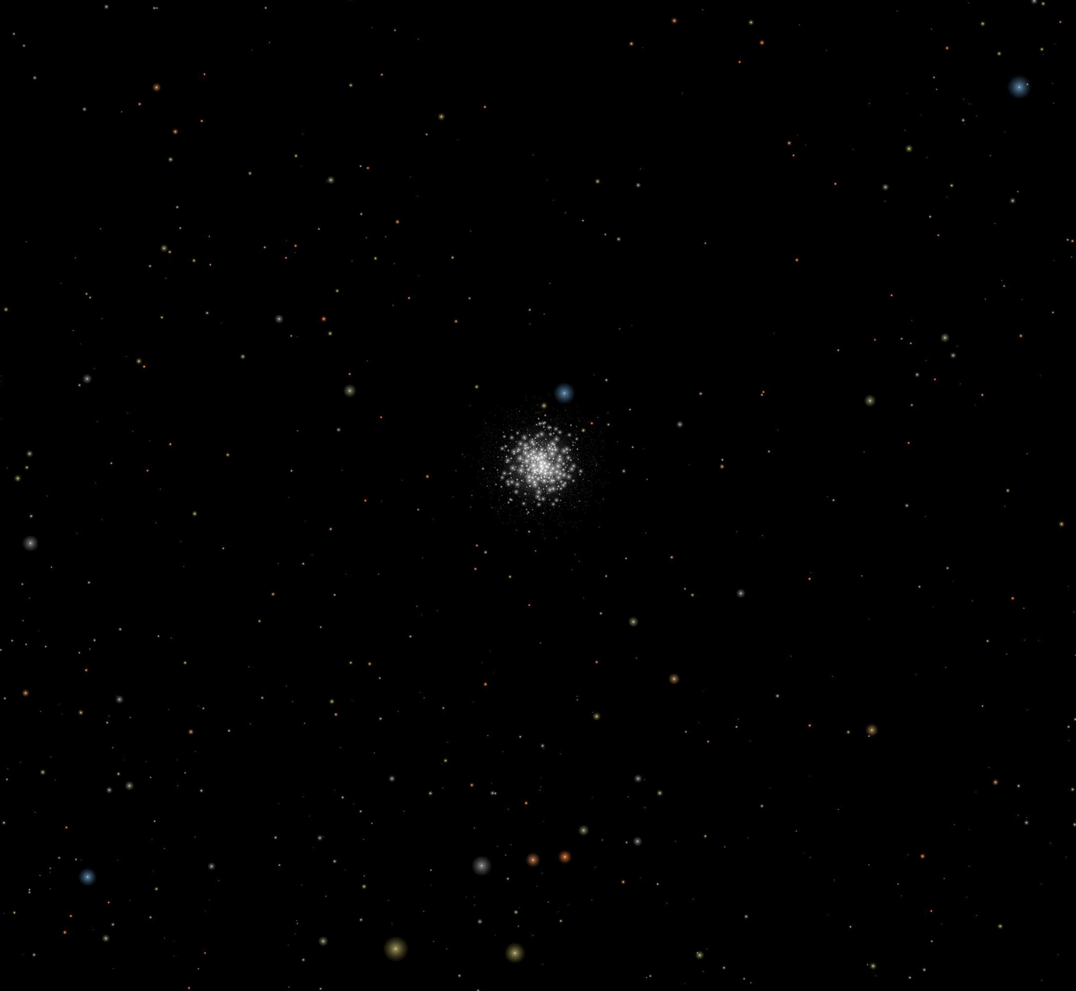 Globular cluster NGC 4372